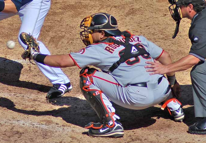 Guillermo Rodríguez